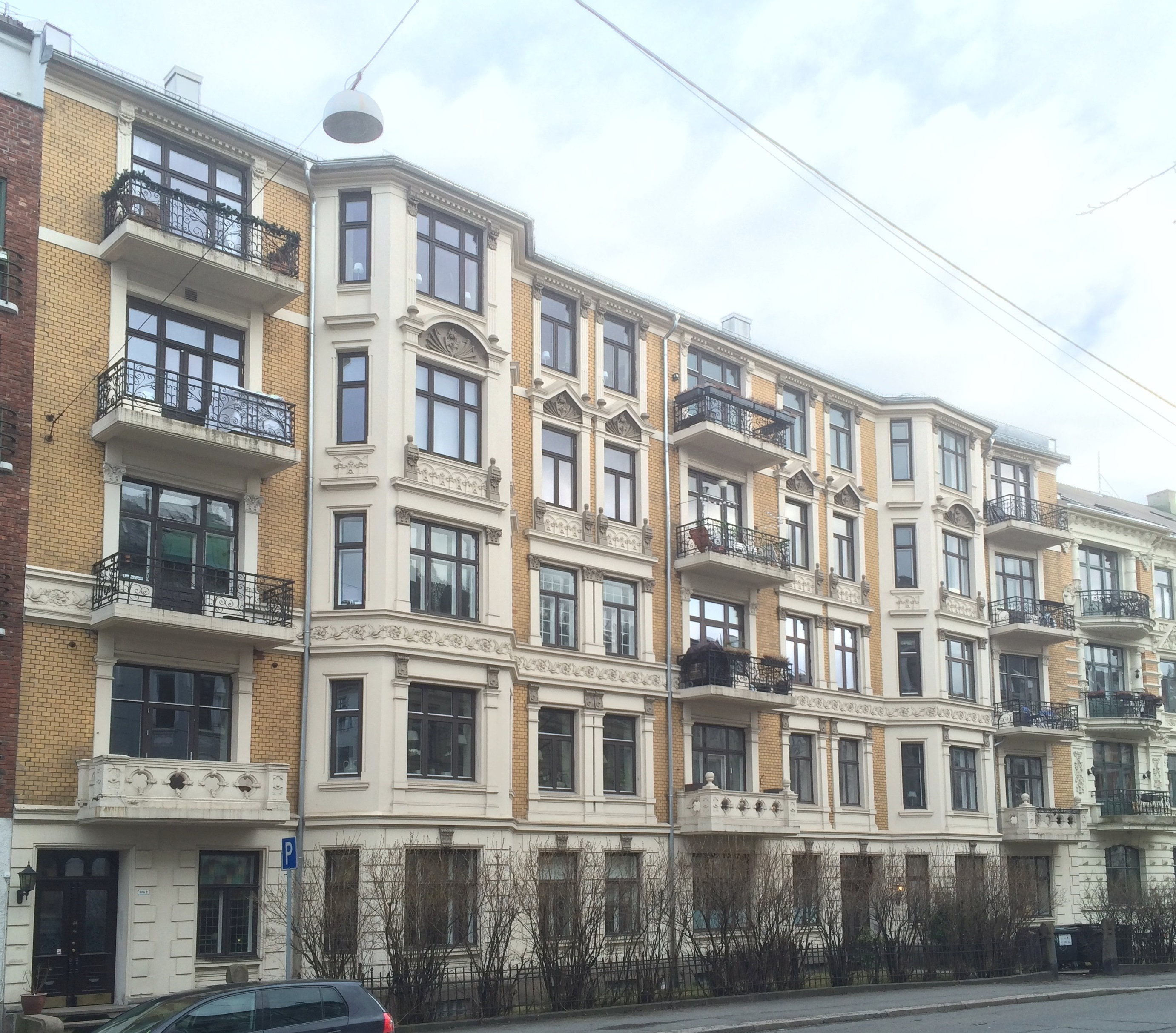 Camilla Colletts vei 9. Arkitekt: Karl Høie (1898–99).